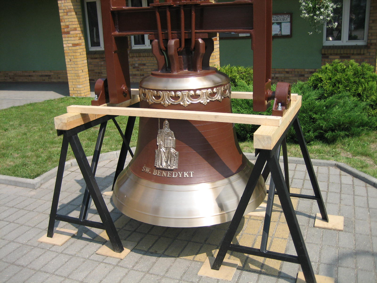 zdjęcie dzwonu